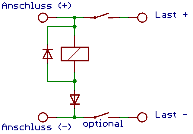 Verpolungsschutz mit Relais ---- FEHLER IM PLAN !